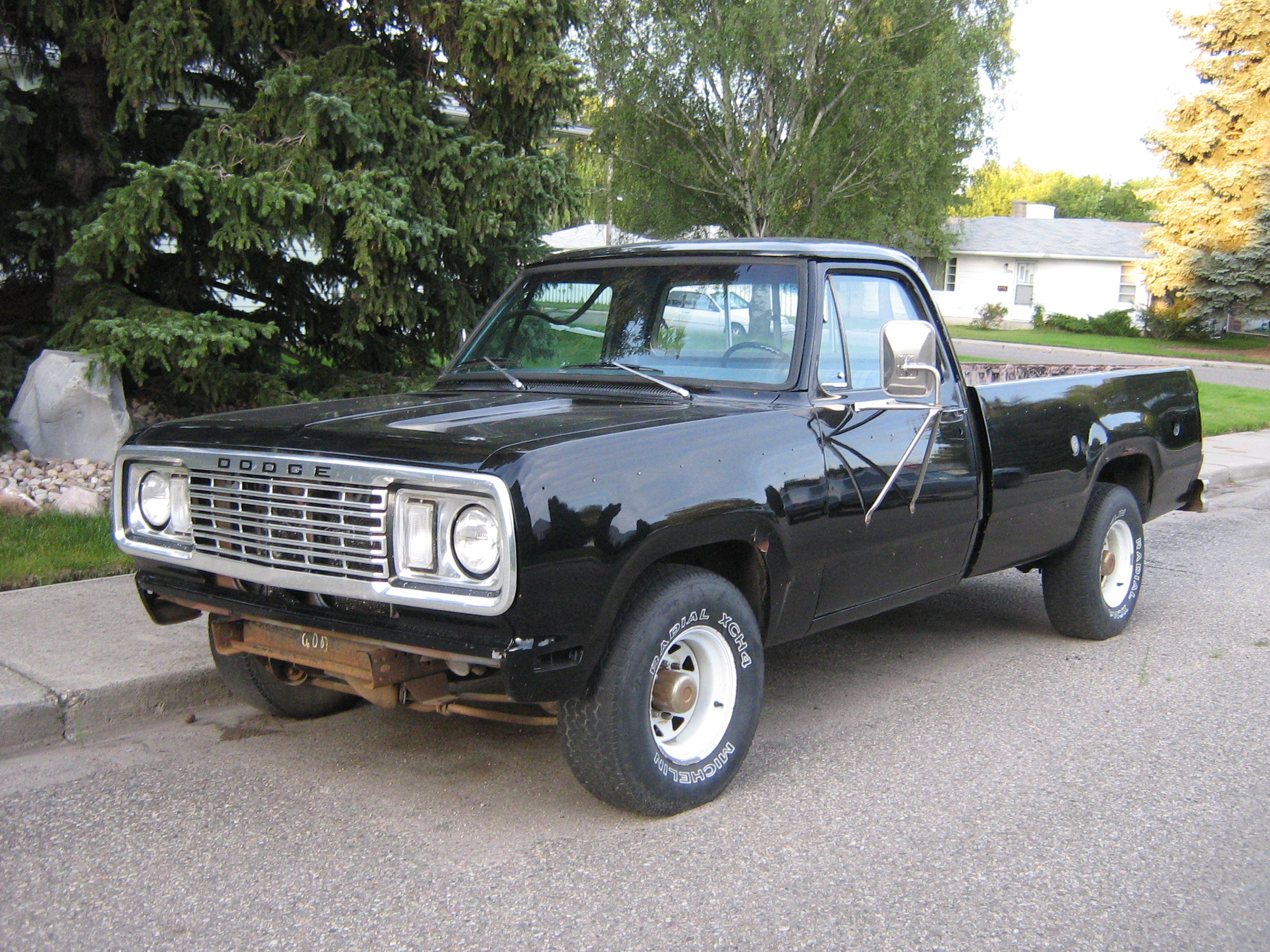 Dodge Truck